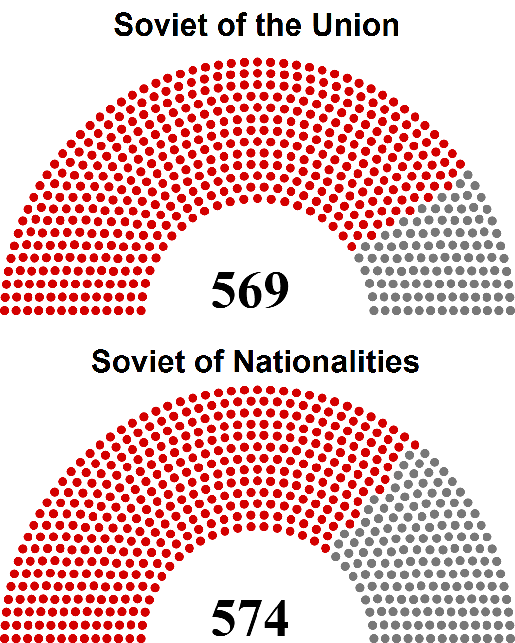 Soviet of the Union Communist party of the Soviet Union: 461 seats Independents: 108 seats Soviet of Nationalities Communist party of the Soviet Union: 409 seats Independents: 165 seats